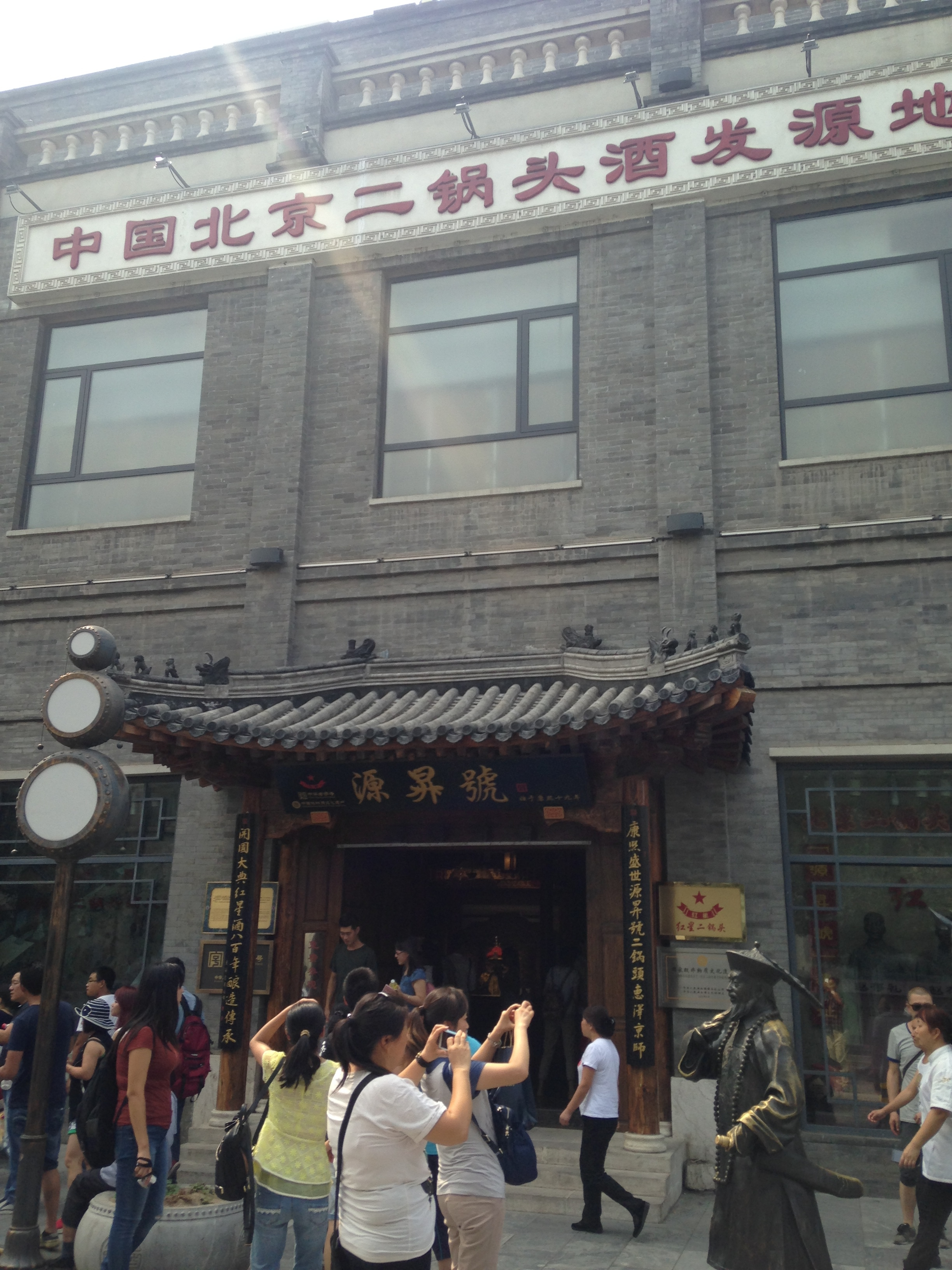 前門大街にある源昇号博物館